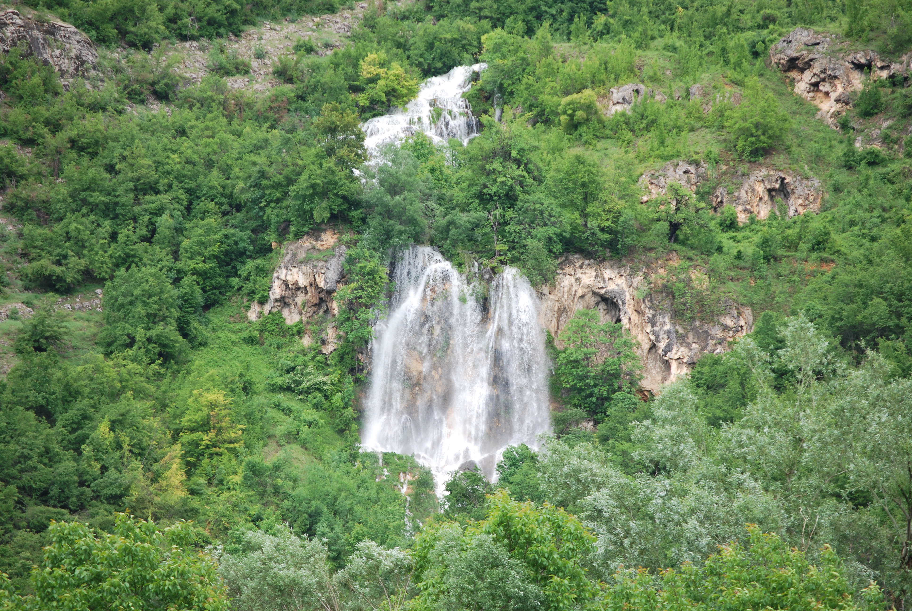 Гложенски водопад "Вара", с. Гложене, община Ловеч